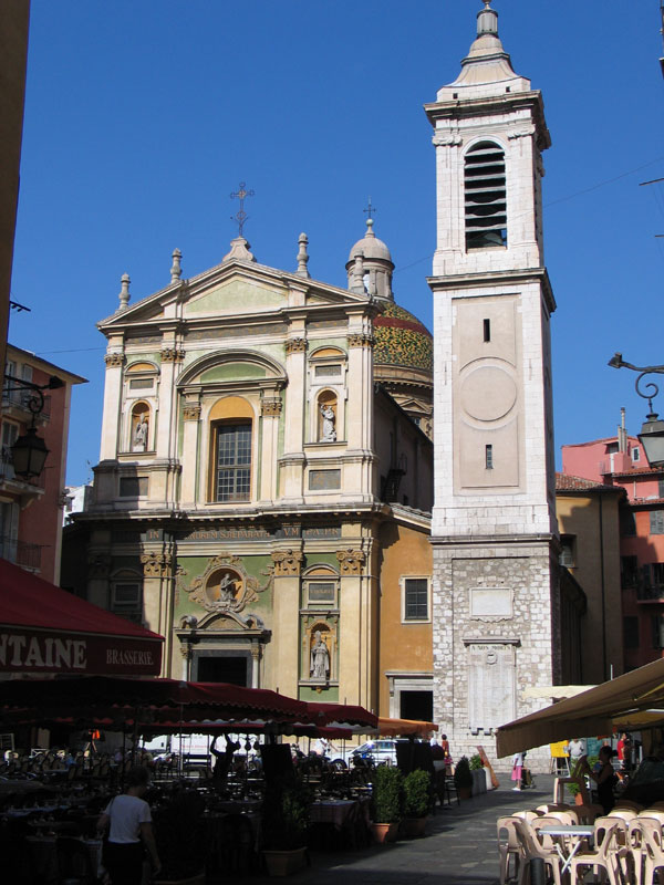 Vue de la cathédrale Ste-Réparate à Nice